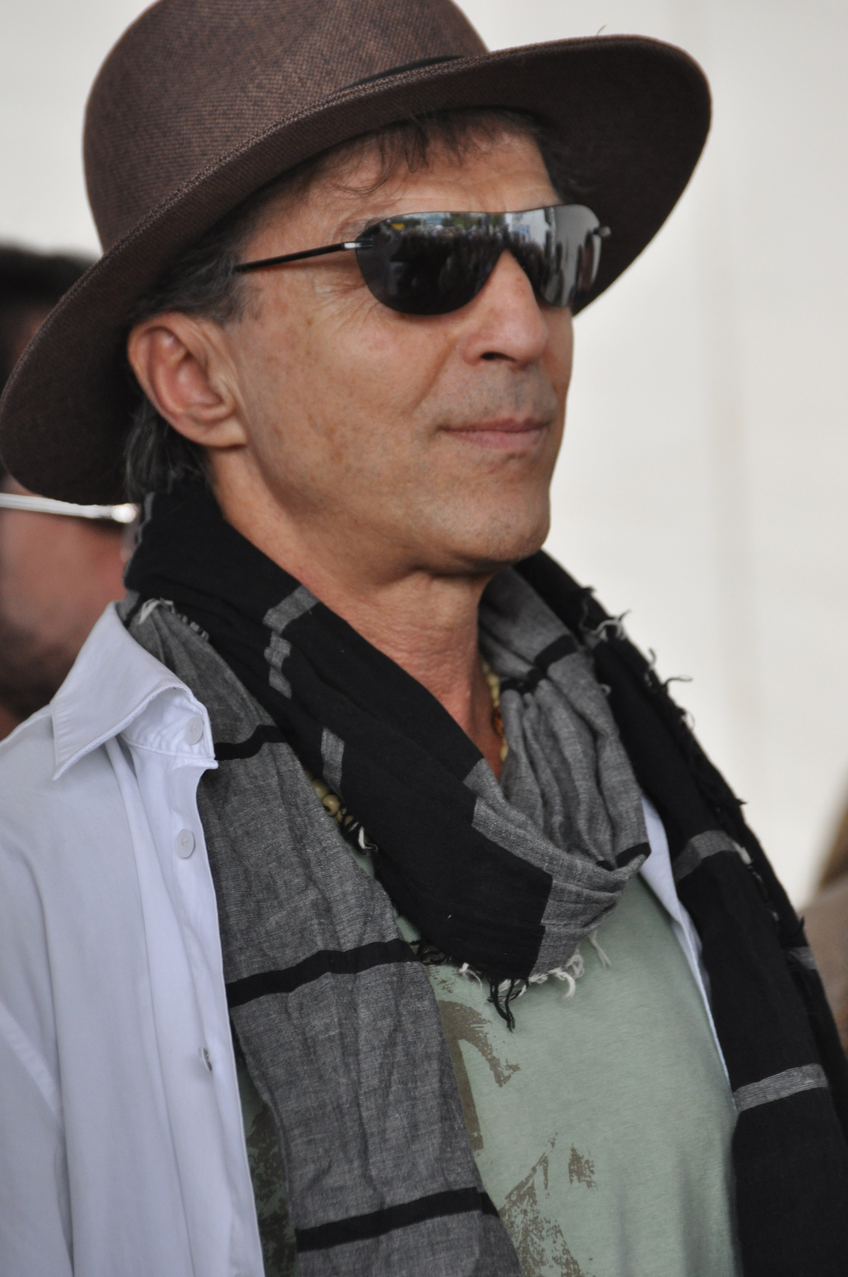 Lançamento Passos dos Jesuítas - Itanhaém (17)